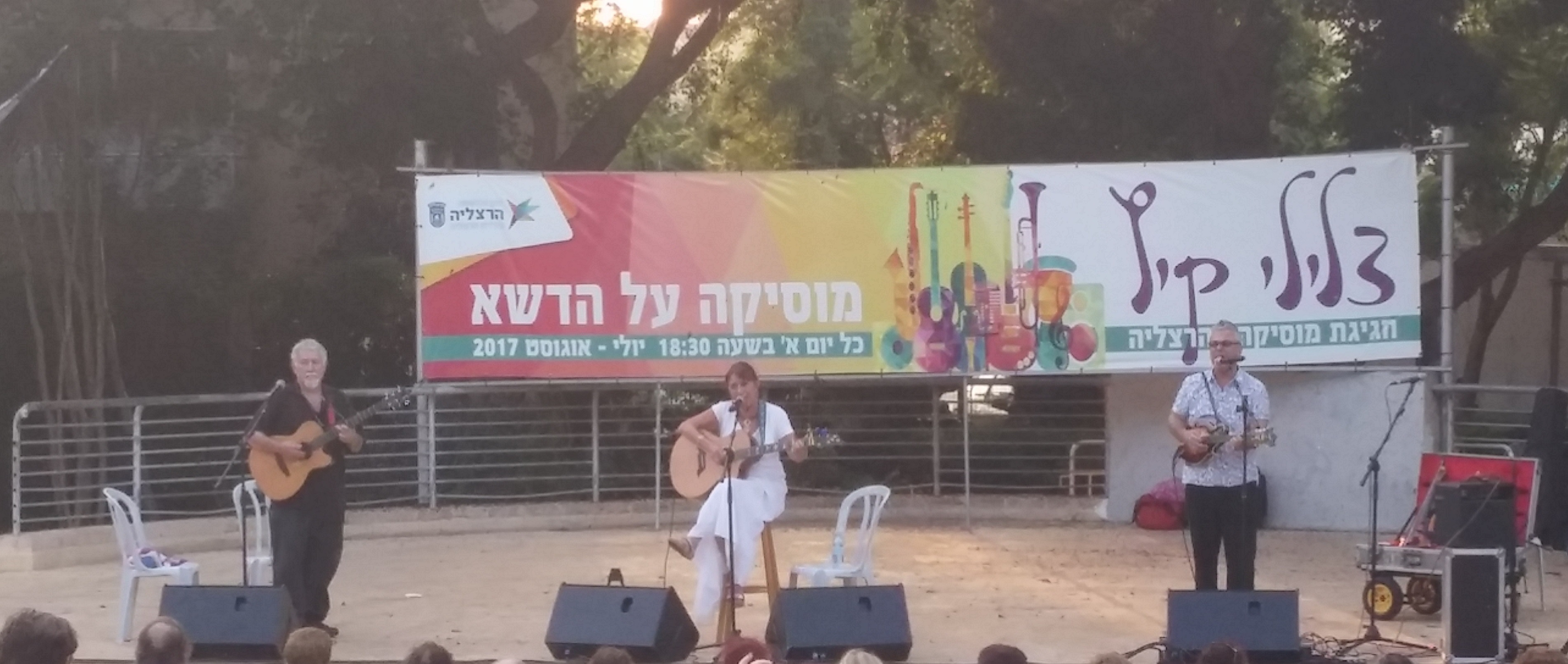 יונתן מילר, שולי נתן ושי טוחנר